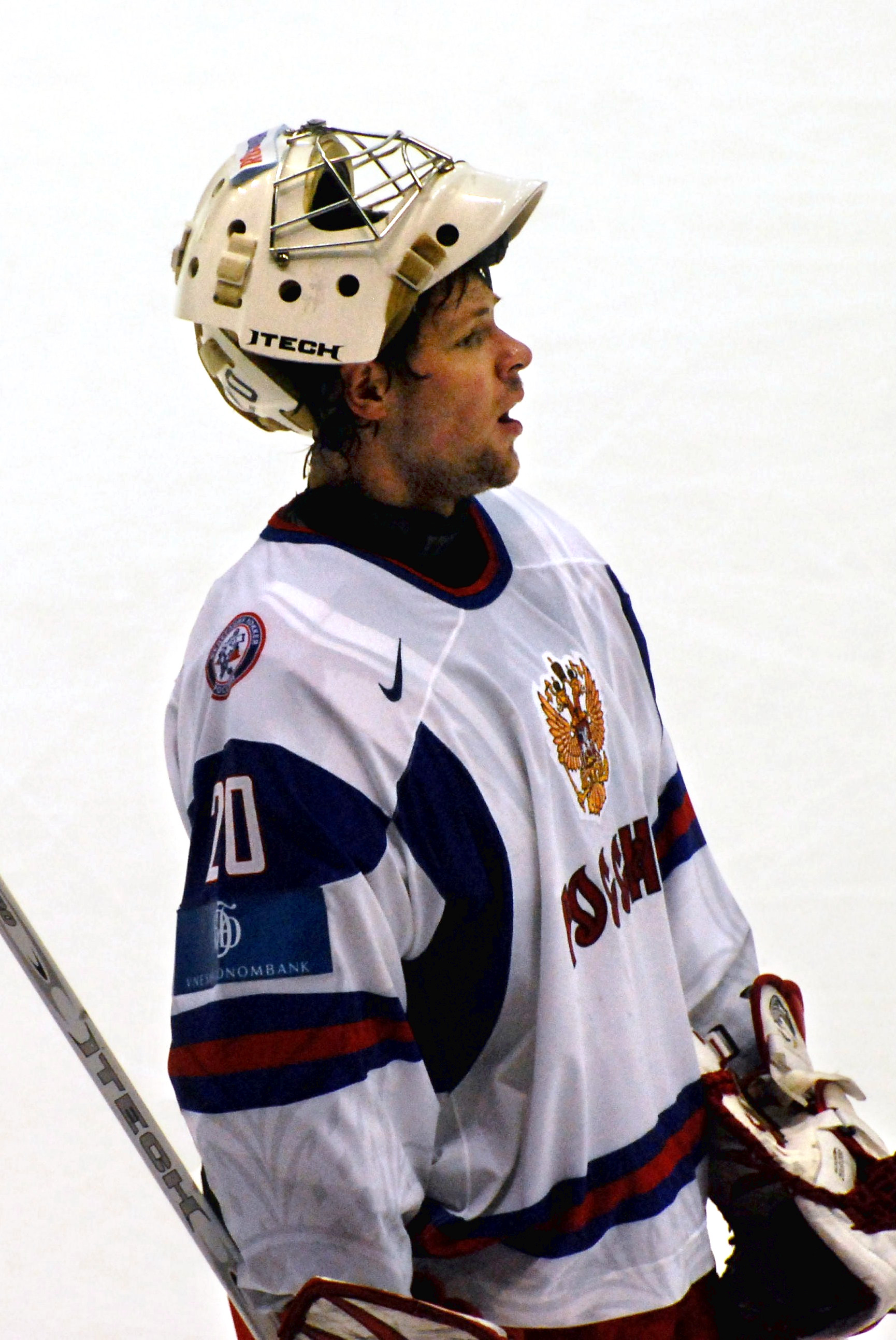 Igor Bobkov